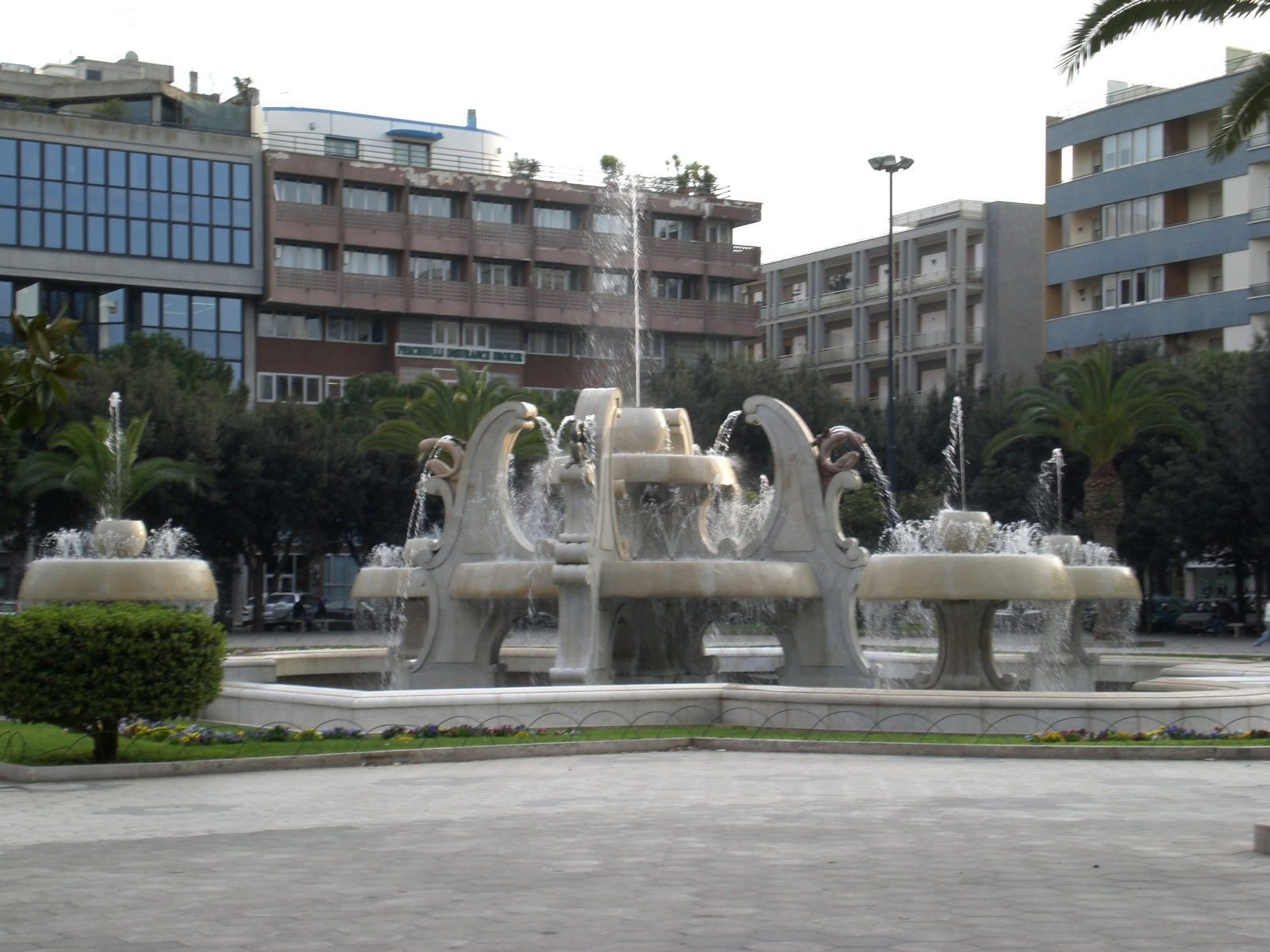 (Paride De Carlo)